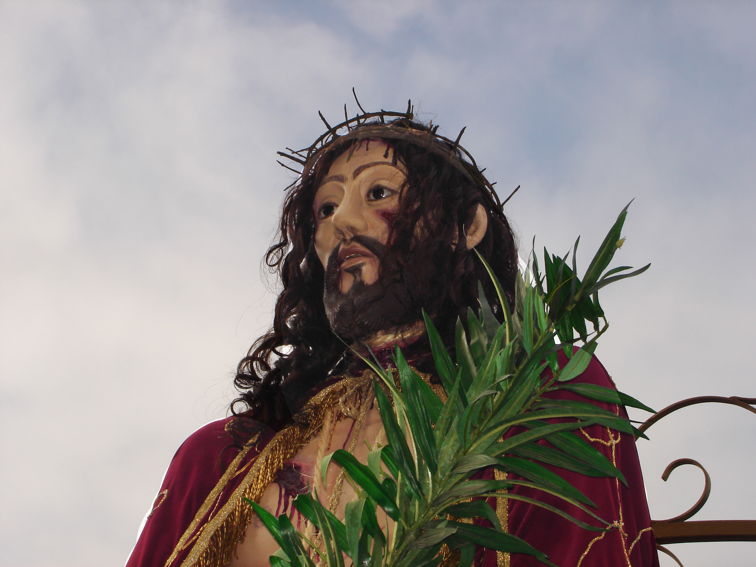 Esta foto foi tirada quando a histórica Imagem do Senhor Bom Jesus de Tremembé foi visitar a Basílica de Aparecida. No dia 5 de maio de 2006.